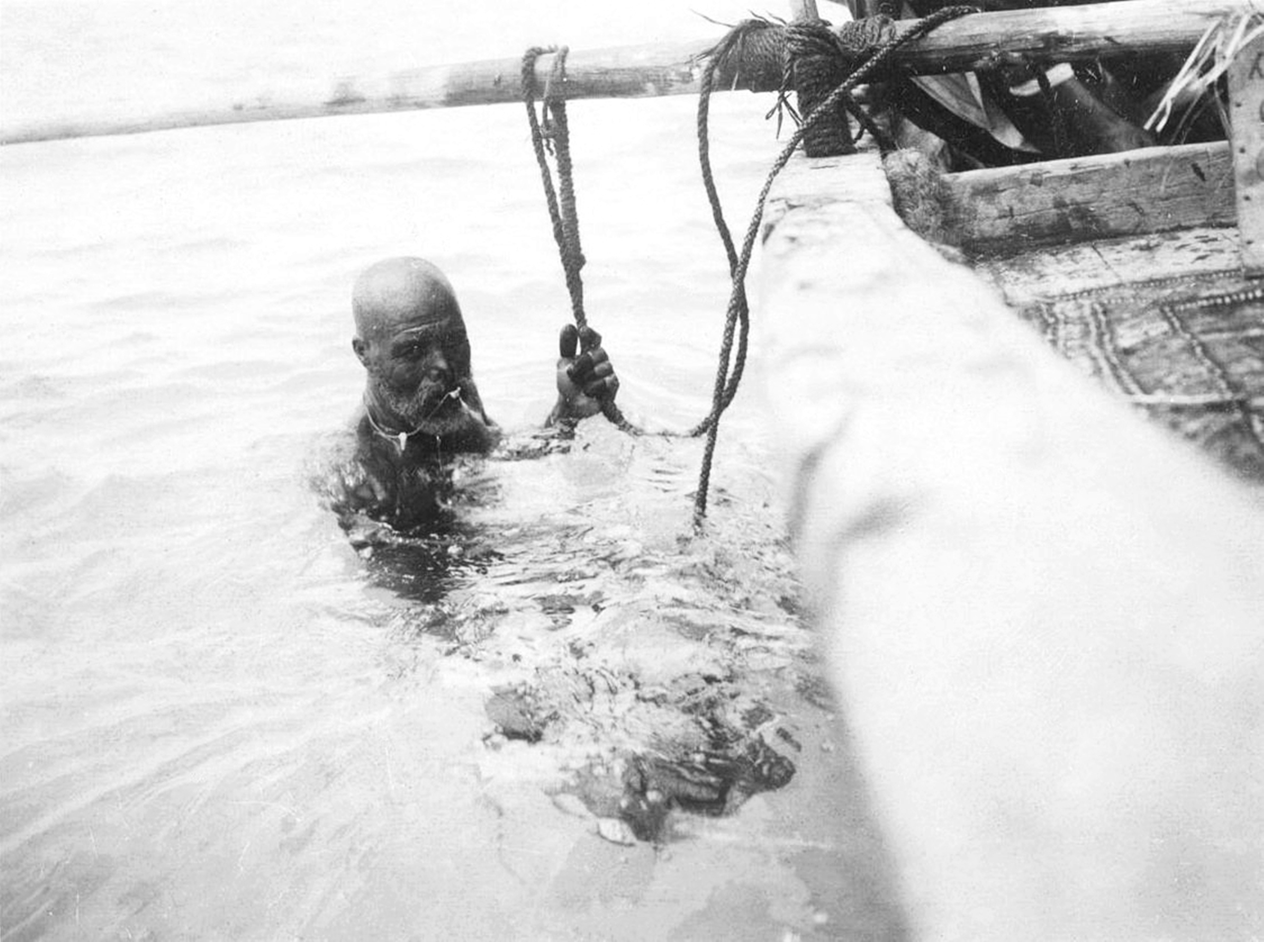 طوّاش مُستعد للغوص في المحرق.